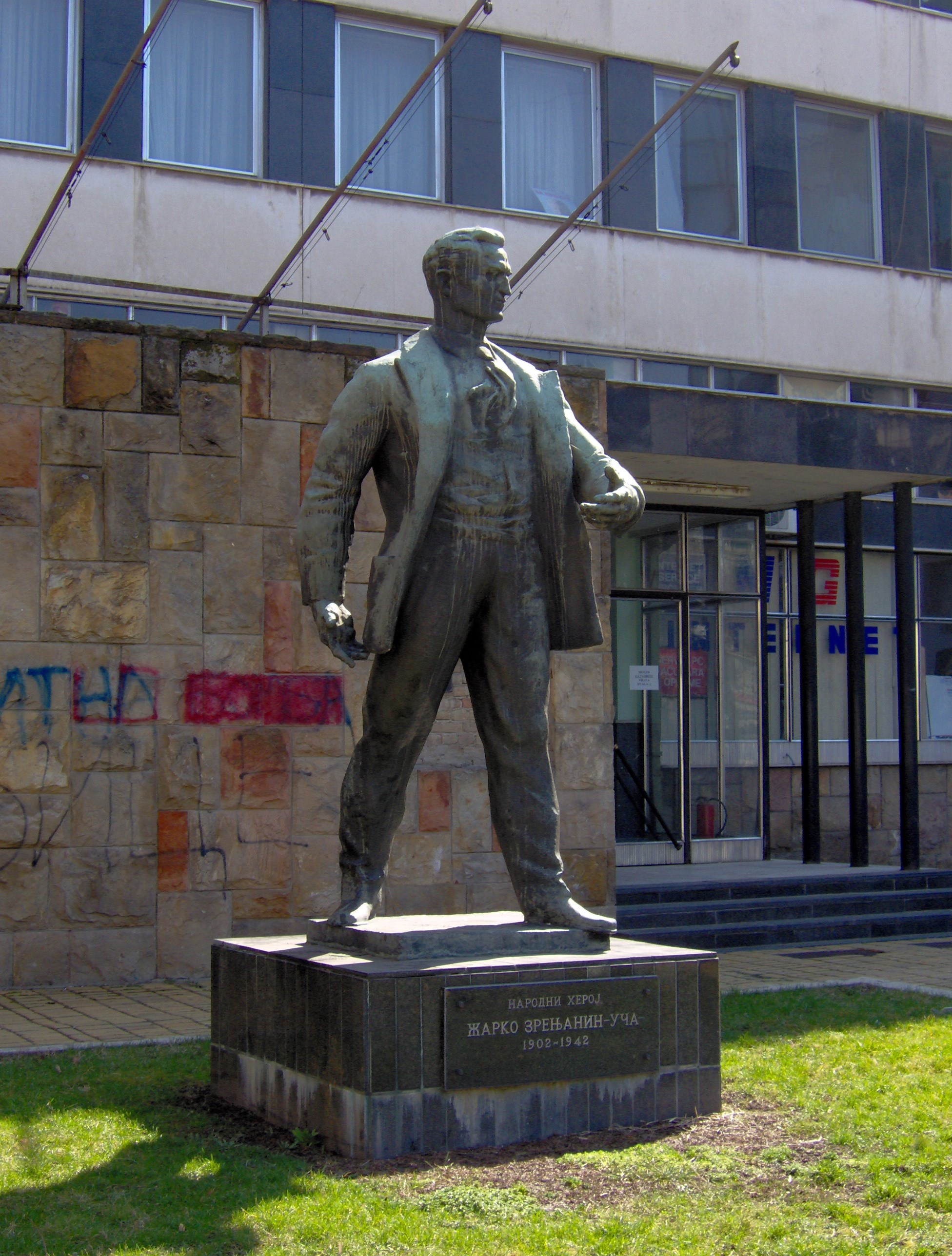 Spomenik Žarku Zrenjaninu